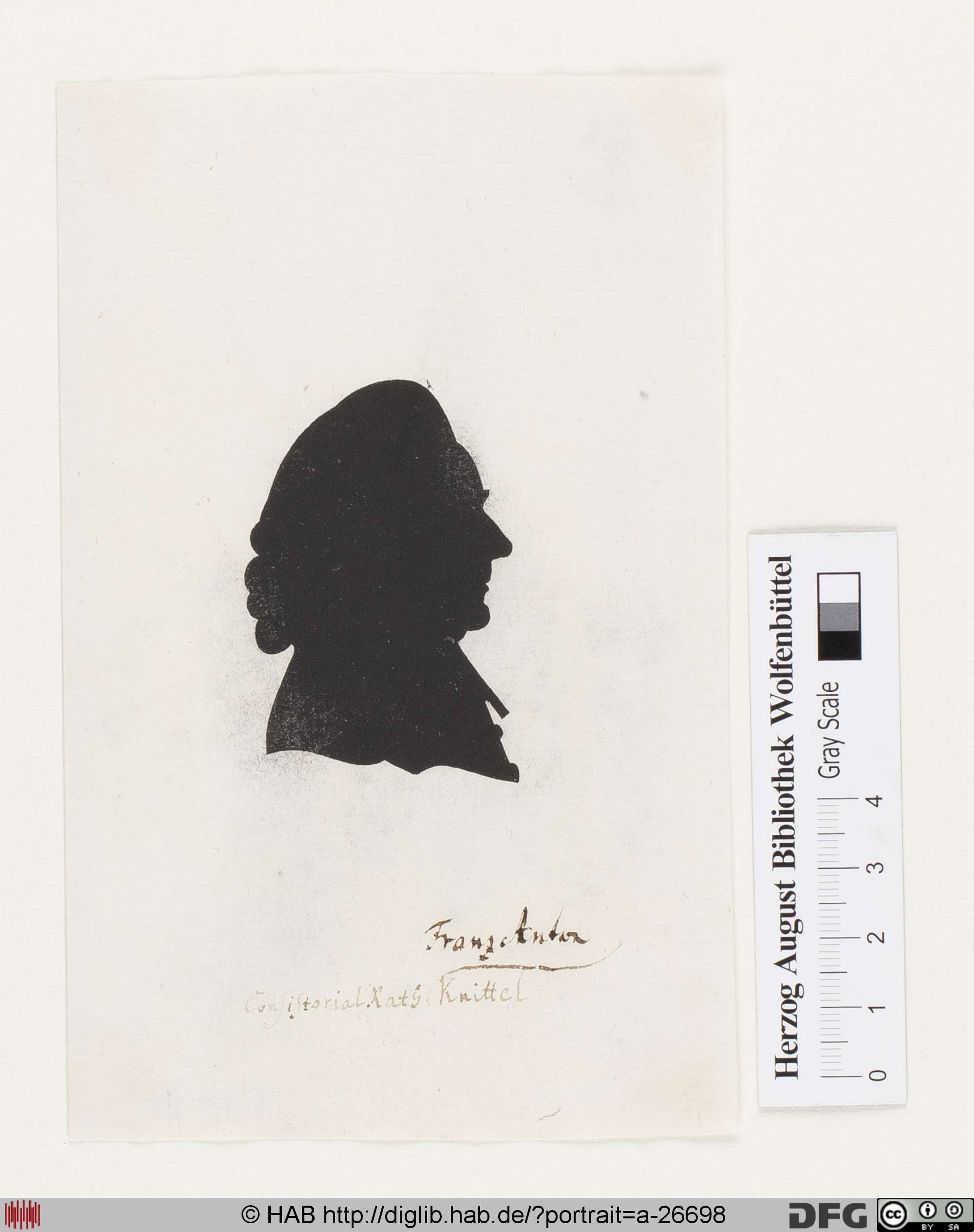 Silhouette Franz Anton Knittel.